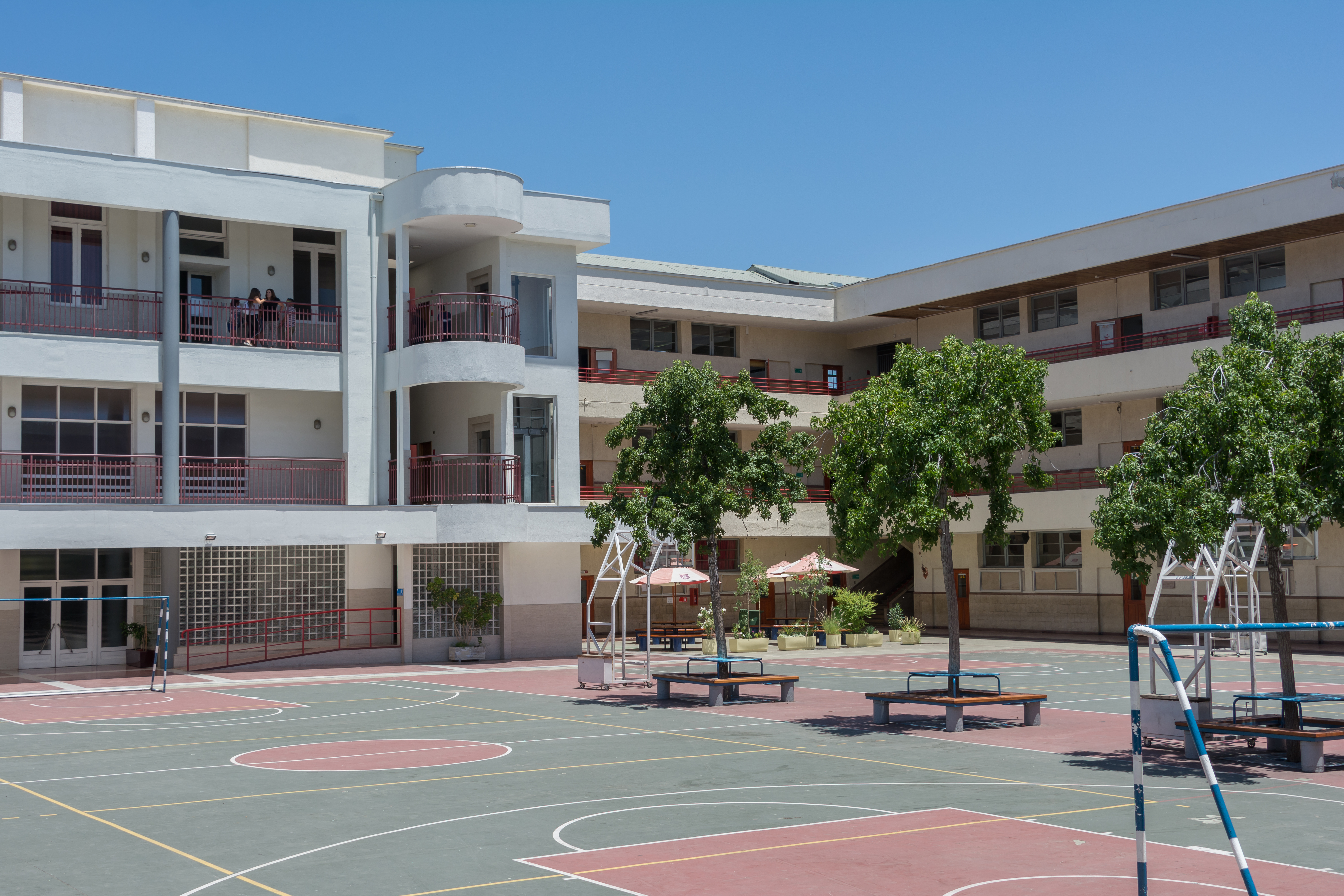 Instituto Alonso de Ercilla, Santiago, Región Metropolitana, Chile.